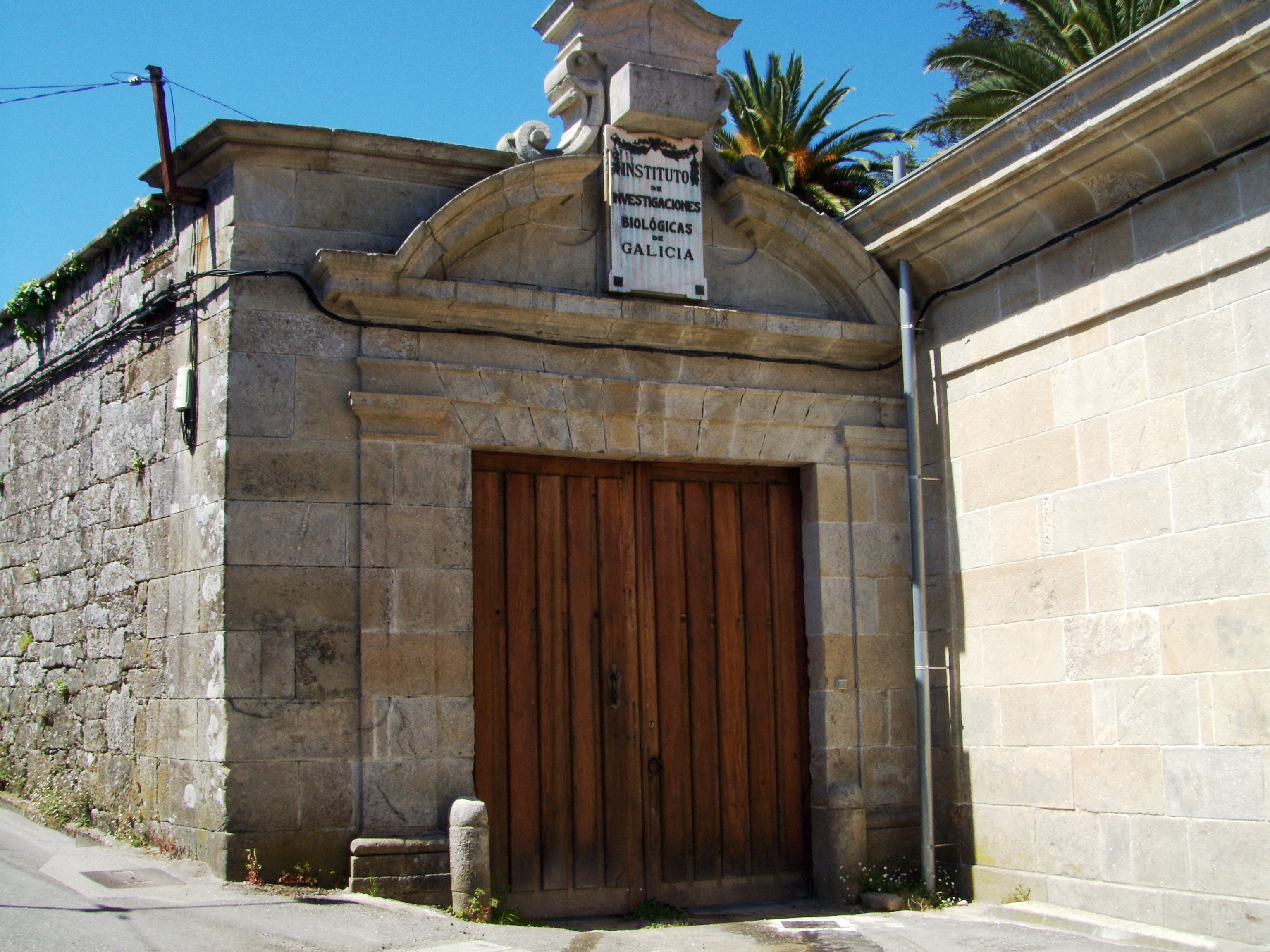 Instituto de Investigaciones Biológicas de Galicia, puerta del Pazo de la Carballeira de Gandarón, junto a la capilla. Salcedo, Pontevedra.